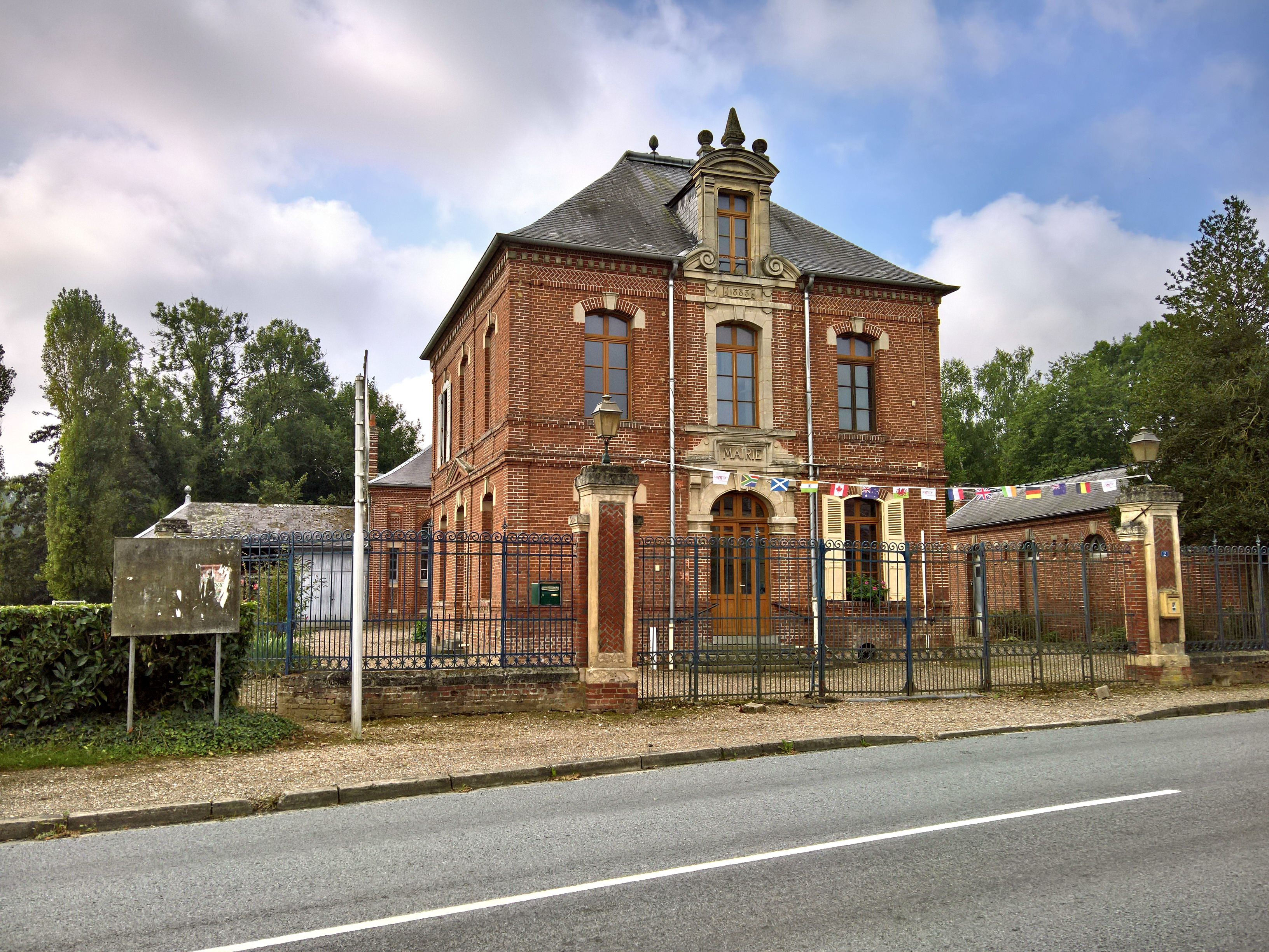 La mairie de Frémontiers (Somme) date de 1883.